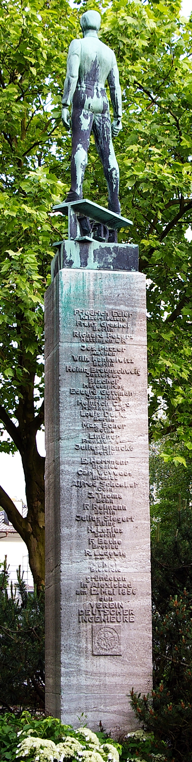 Gründerstatue Verein Deutscher Ingenieure in Düsseldorf, Rückseite mit Gründungsmitgliedern